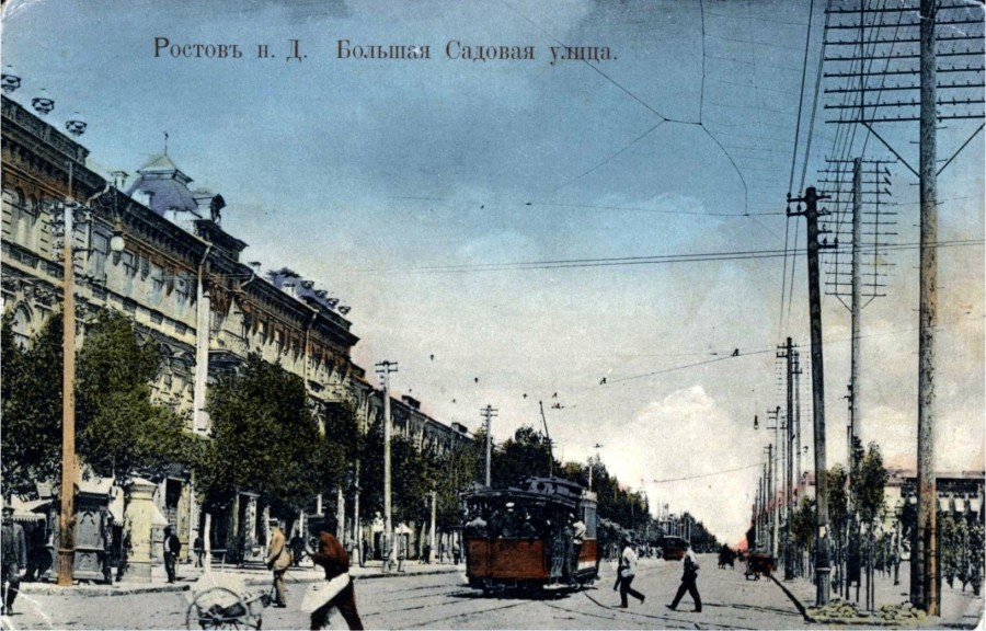 Большая Садовая улица в Ростове-на-Дону. Дореволюционная открытка.